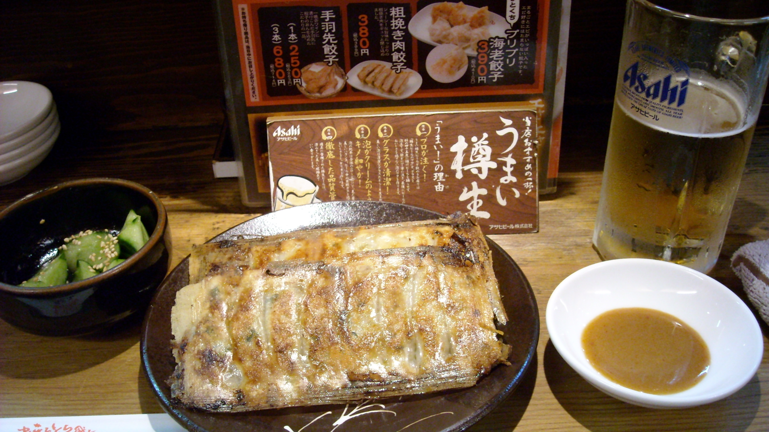 焼き餃子の例